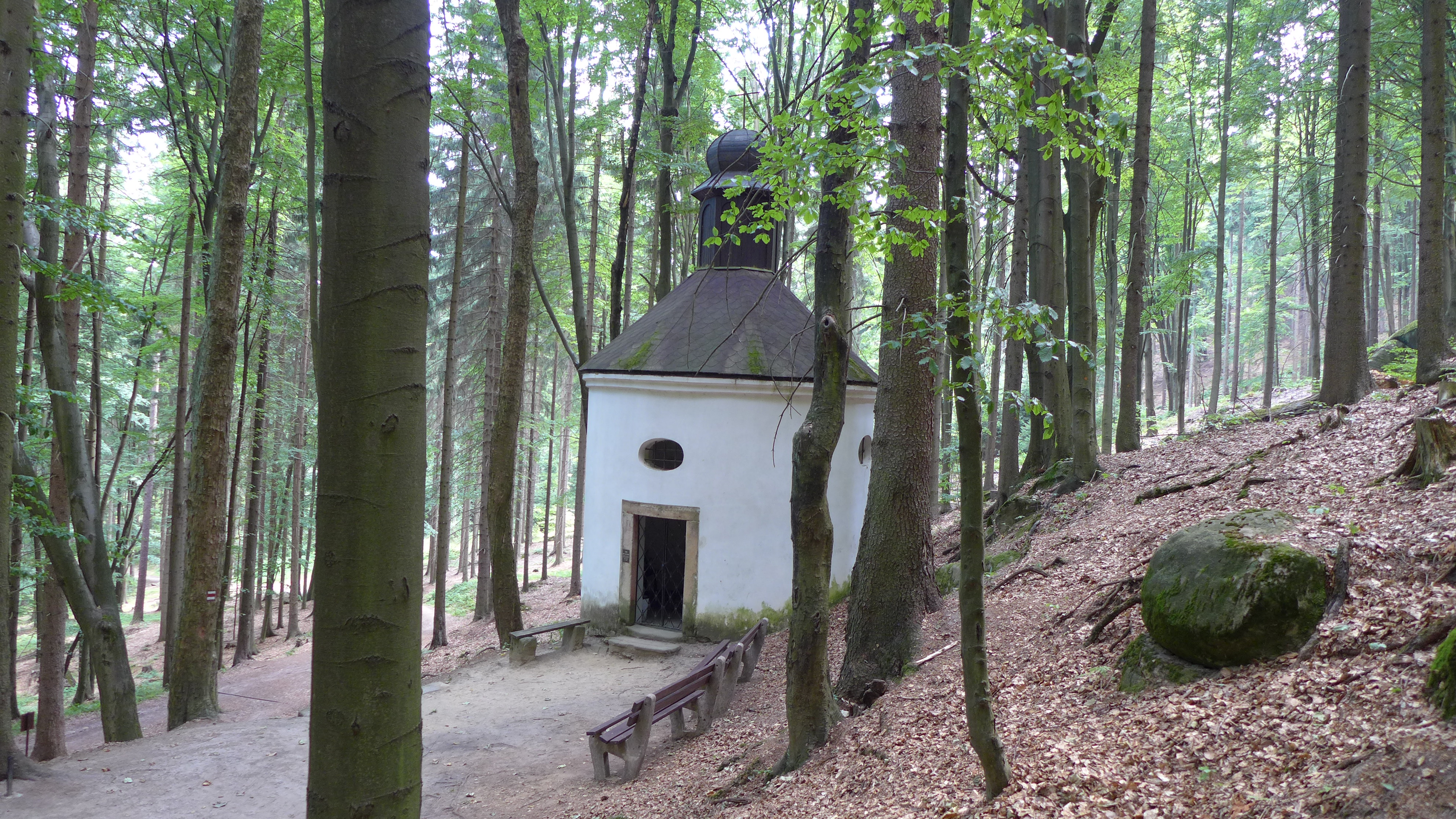 Kaplička Panny Marie Sněžné pod Hvězdou, pod hřebenem Broumovských stěn, Křinice.